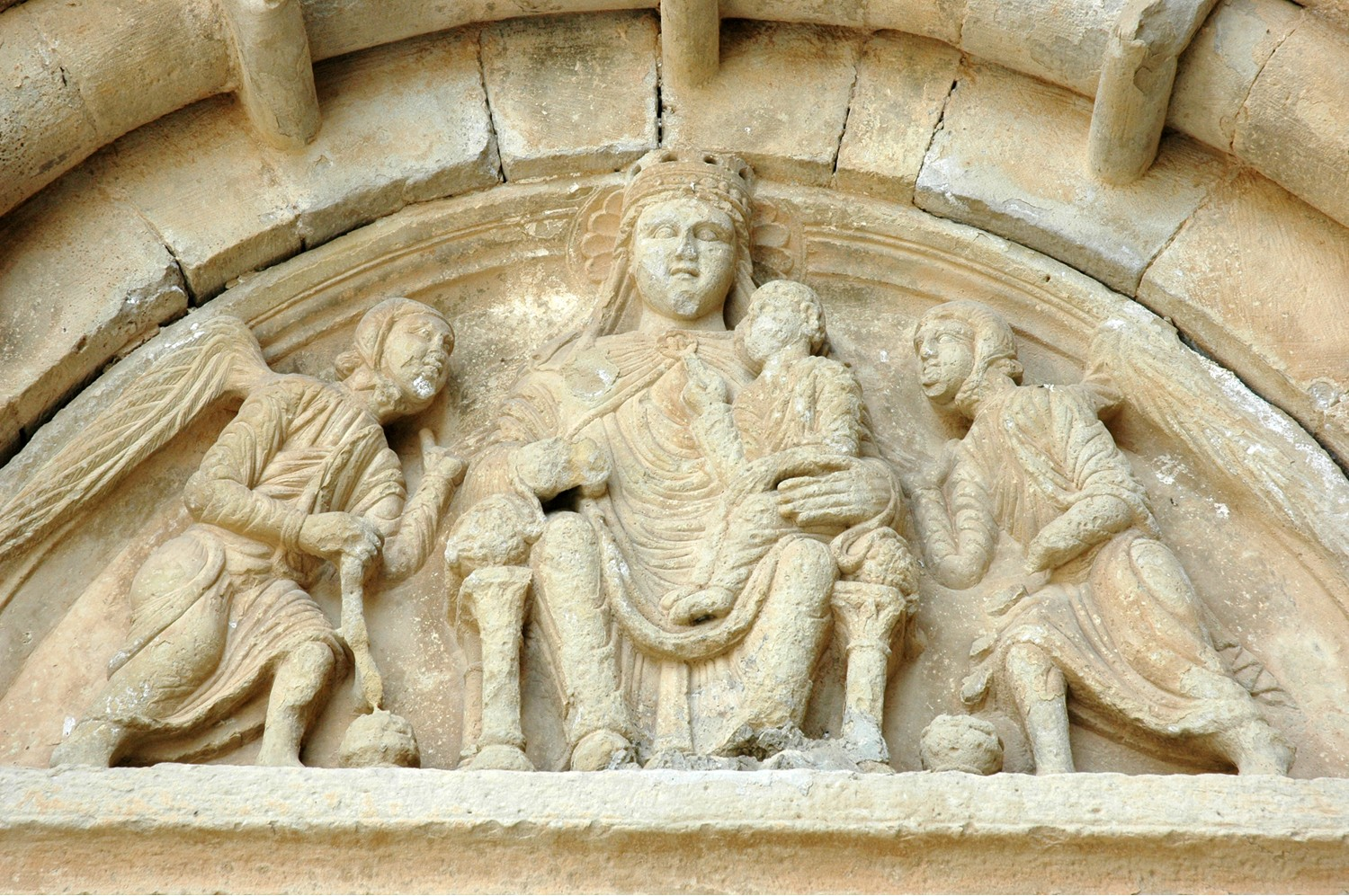 Vallbona de les Monges - Timpà amb la figura de la Mare de Déu entronitzada amb el Nen assegut sobre el genoll esquerre, estan flanquejats per dos àngels turiferaris